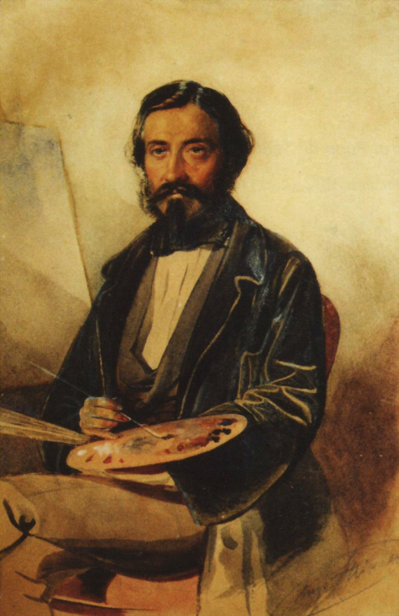 Gheorghe Tattarescu de August Strixner, acuarelă/hârtie, 25.2x18cm, semnat dreapta jos, în creion negru Aug. Strixner, nedatat, inv. 201, Muzeul Municipiului București - Muzeul Gheorghe Tattarescu